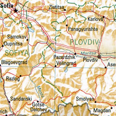 Peschtera - Lage des Ortes in Bulgarien